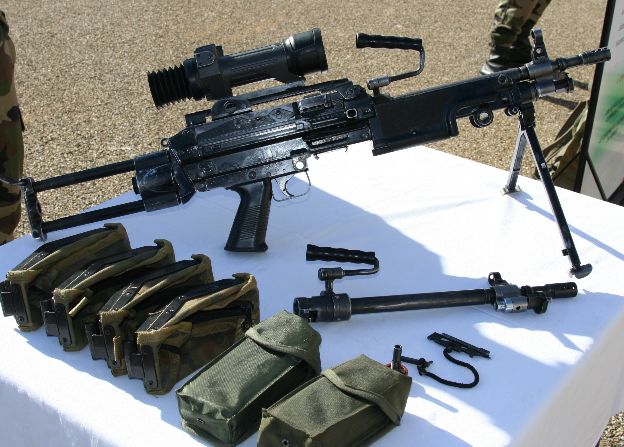 fusil mitrailleur Minimi du 2e Régiment étranger d'infanterie